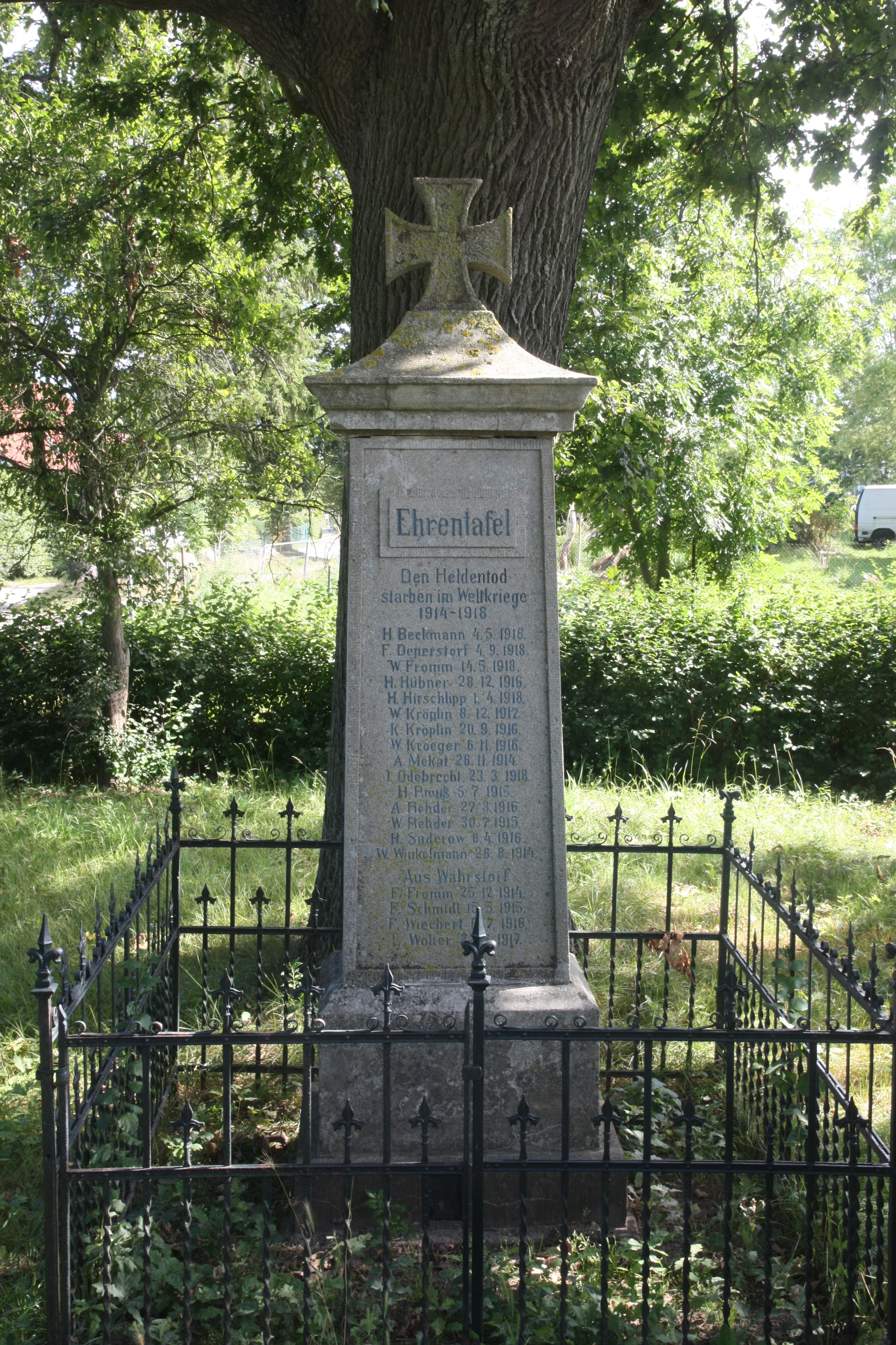 Pölchow, Denkmal für Gefallene im Ersten Weltkrieg